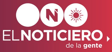 Logo actual del noticiero del mediodia de telfe